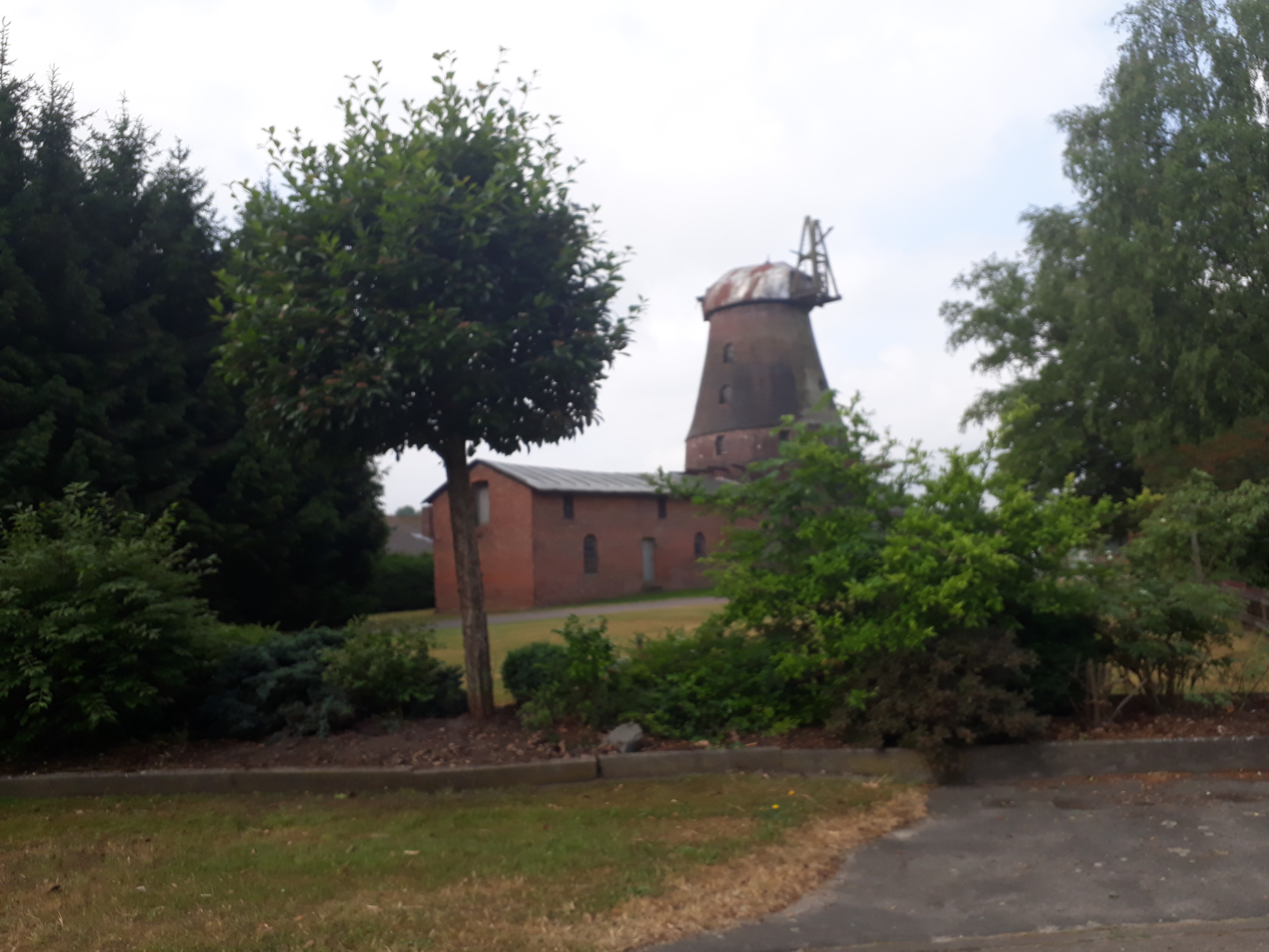 Mühle in Kakerbeck, Gemeinde Ahlerstedt, Landkreis Stade, Niedersachsen.